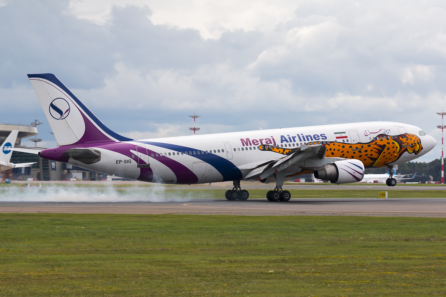 UUWW / 05.07.2016 / Airbus A-300-600 / EP-SIG / Meraj Airlines